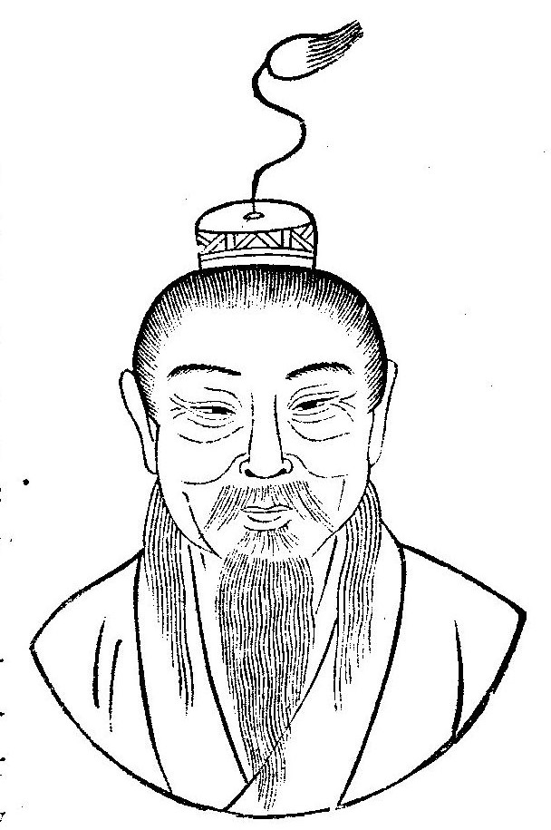 Liu Xiang (Han scholar, 79 - 8 BC)